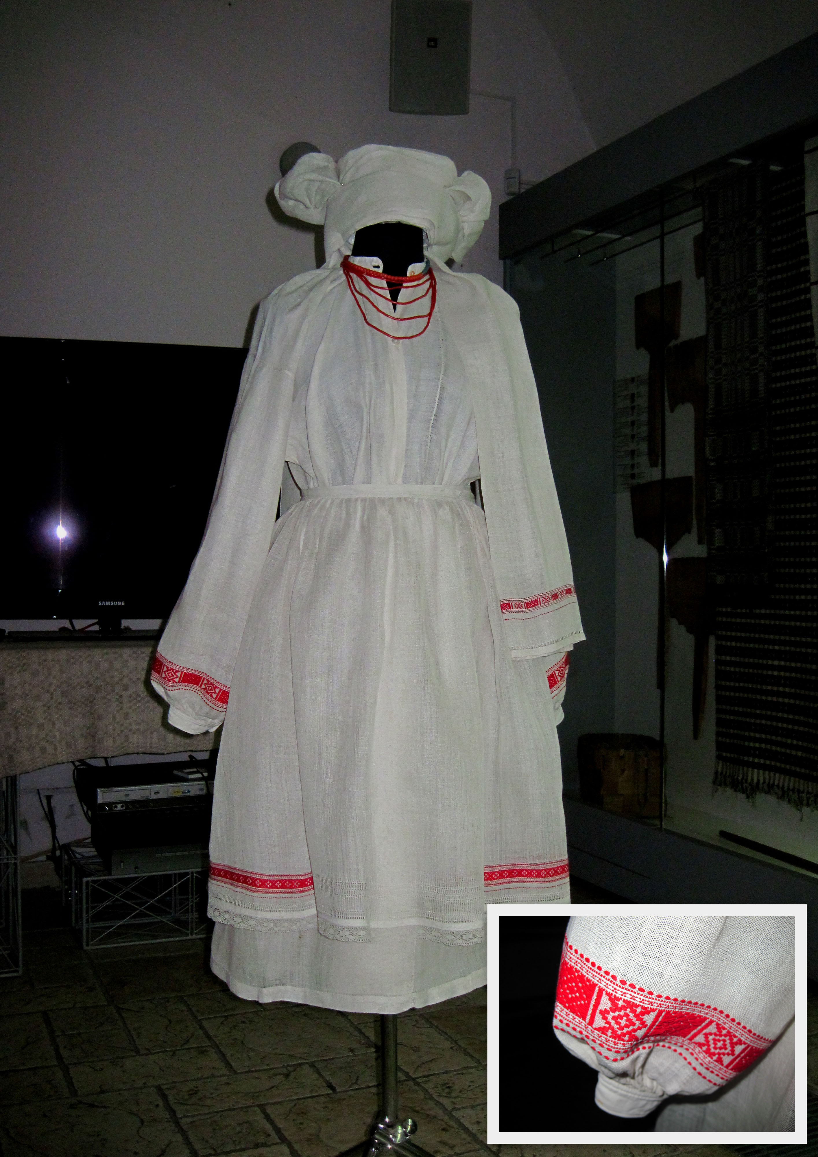 Серпанковий стрій с. Крупове Дубровицького району з колекції Сарненського історико-етнографічного музею та зразок вишивки рукава заволіканням